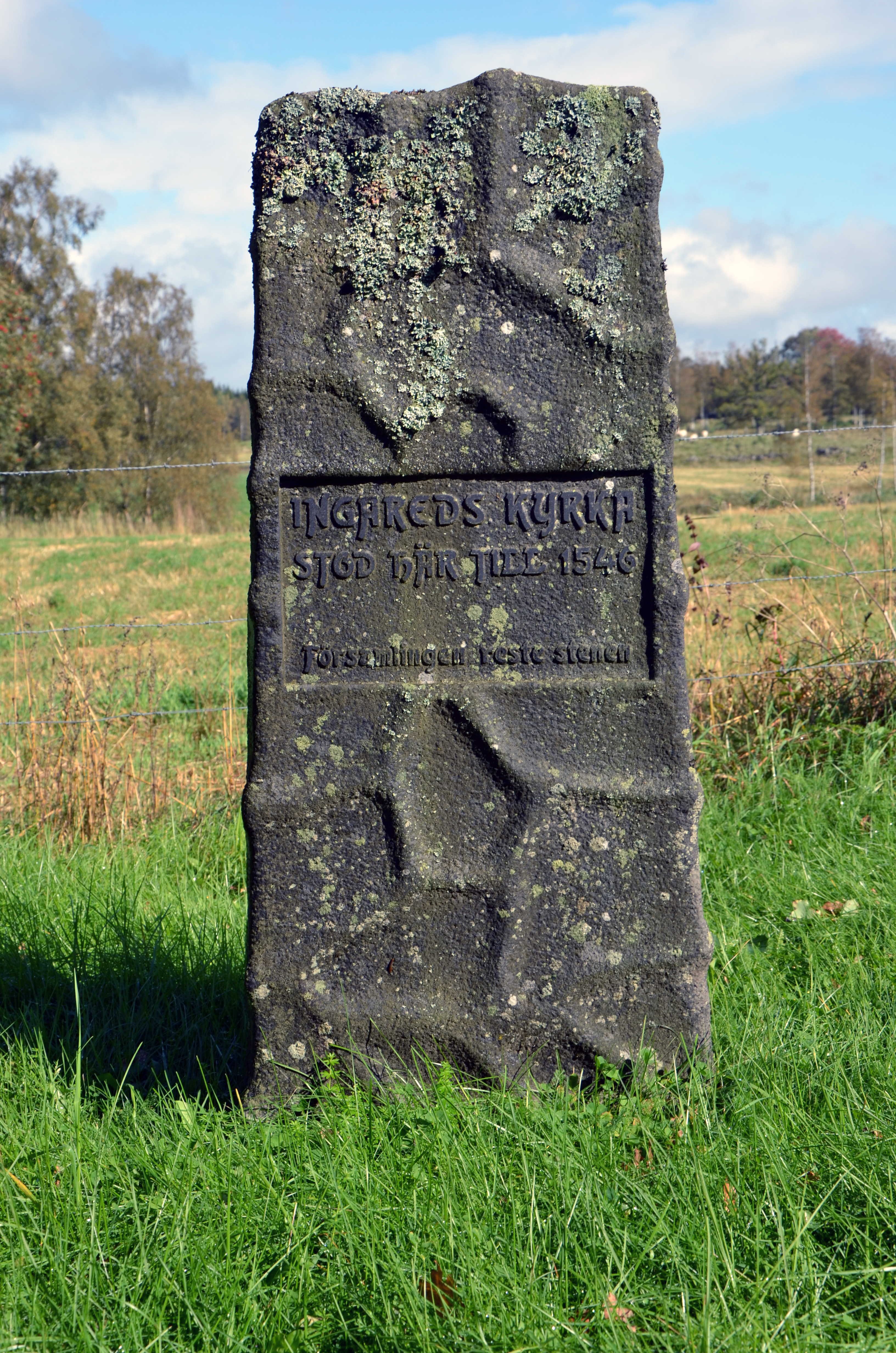 Gedenkstein für die früher an dieser Stelle befindliche Kirche von Ingared am Lönnern Inschrift: "Ingareds Kyrka stod här till 1546 Församlingen reste stenen"